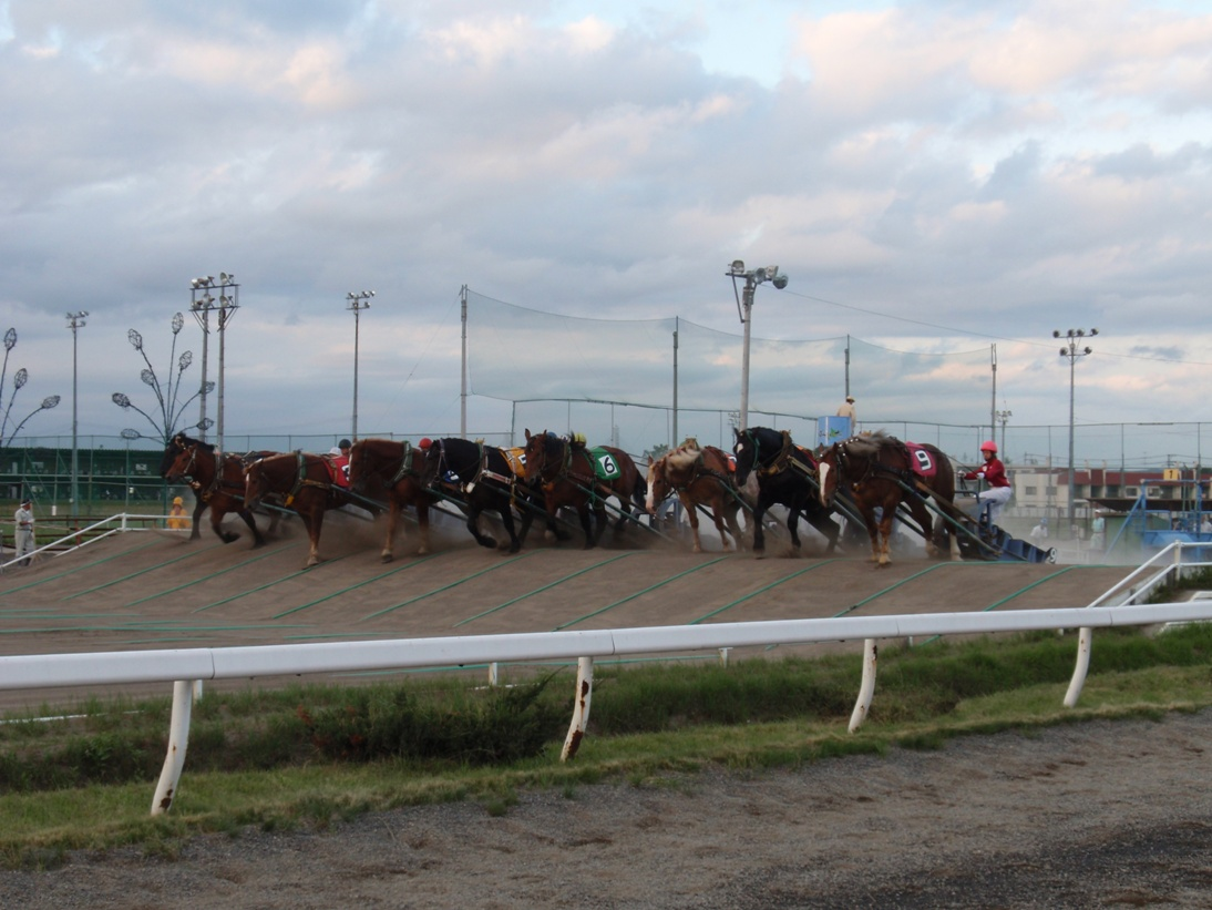 帯広競馬場ばんえい競馬